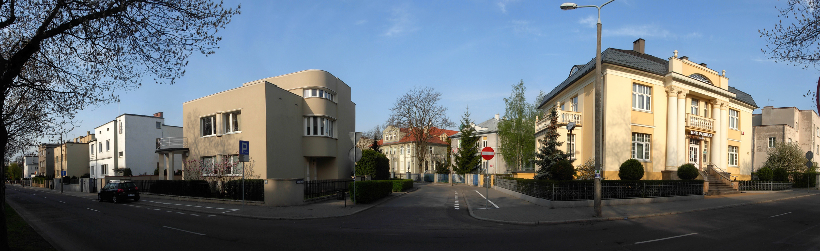 Aleja Ossolińskich w Bydgoszczy